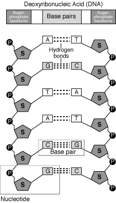 Nucleotide National Human Genome Research